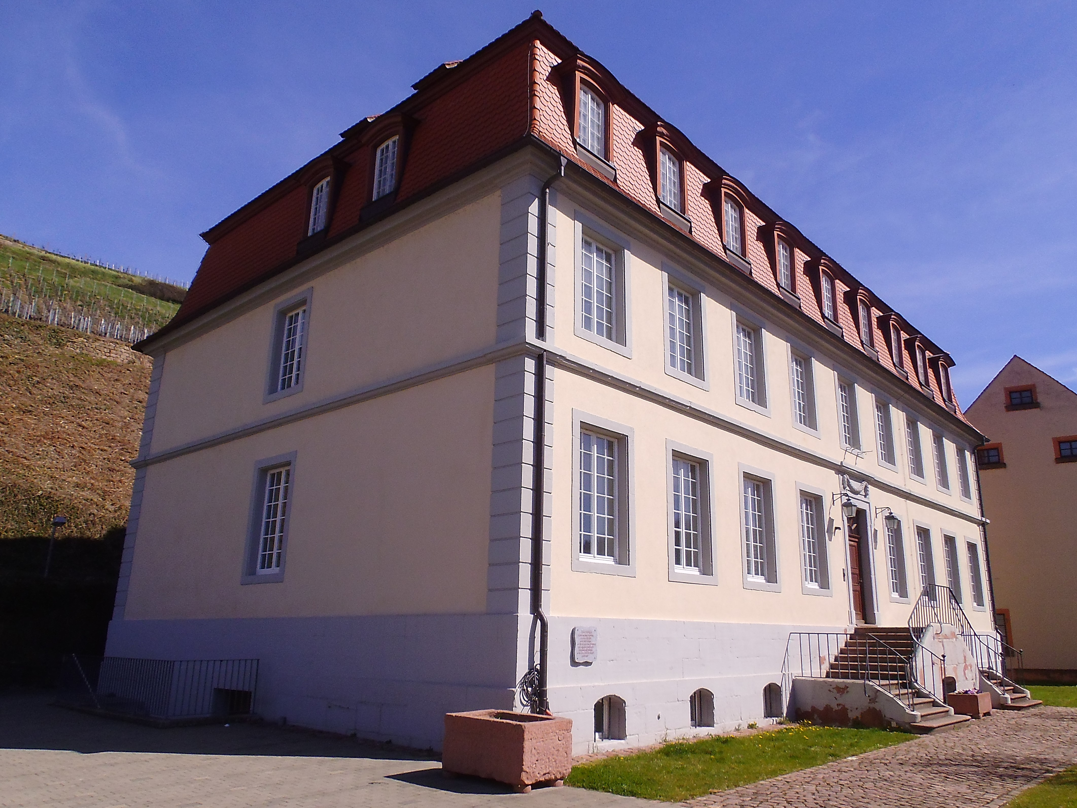 Unteres Schloss in Hecklingen bei Kenzingen. Vom Straßburger Baumeister Francois Pinot im Auftrag des Grafen Karl von Hennin erbaut. Grundsteinlegung 15. Oktober 1776